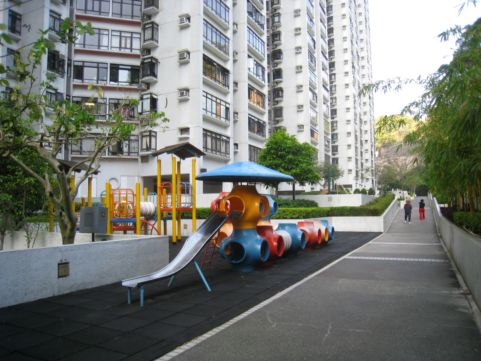 Kornhill Upper Garden View